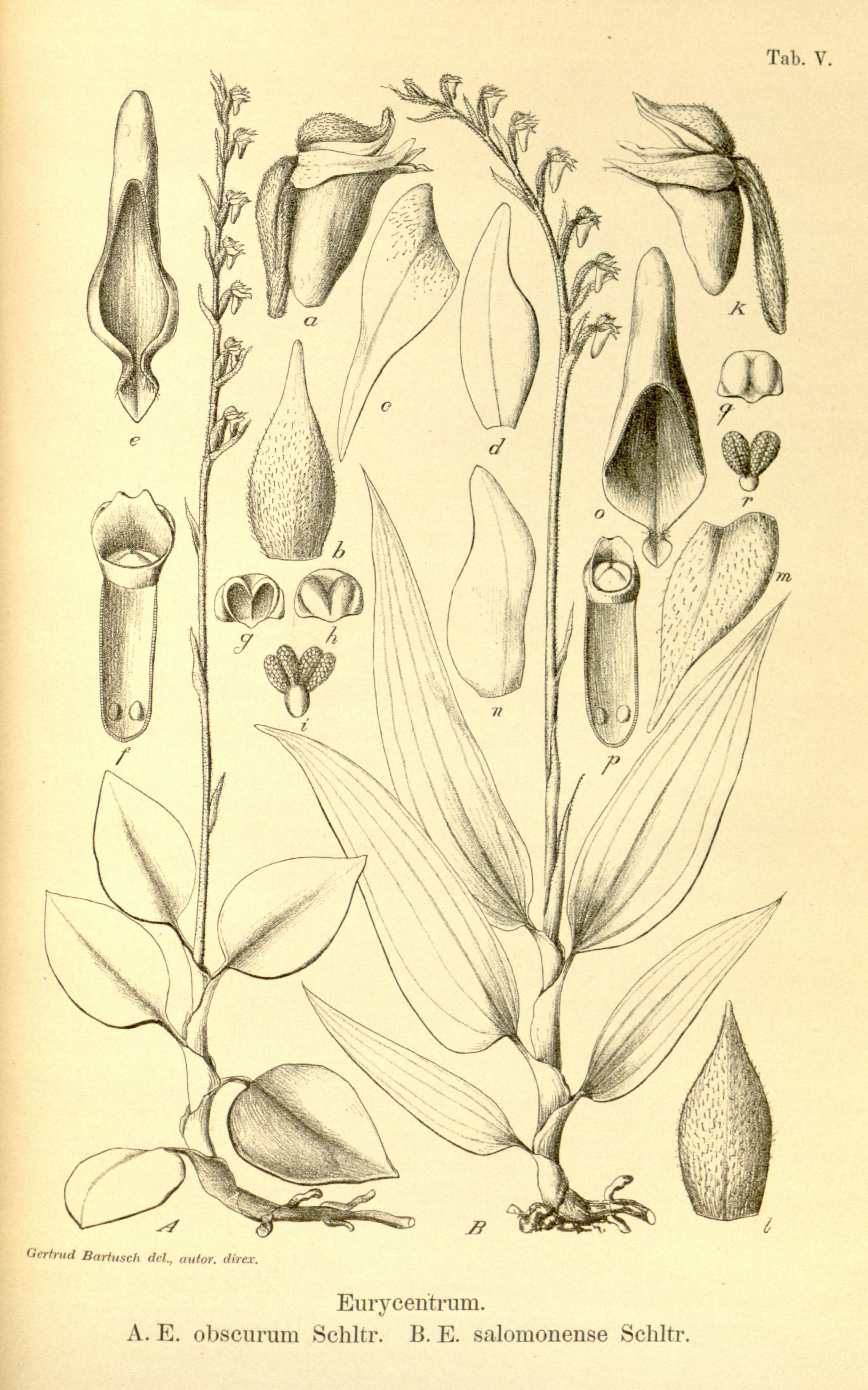 Eurycentrum obscurum & Eurycentrum salomonense